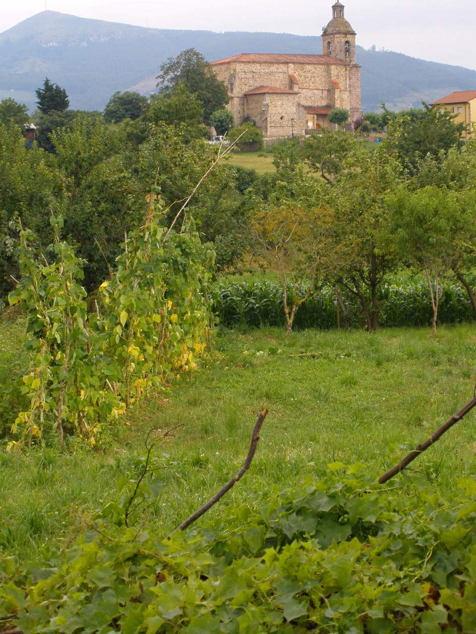 Colindres (Cantabria) - Iglesia de San Juan Bautista (vieja)